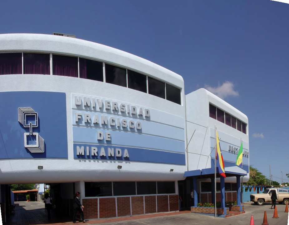 Edificio del Rectorado